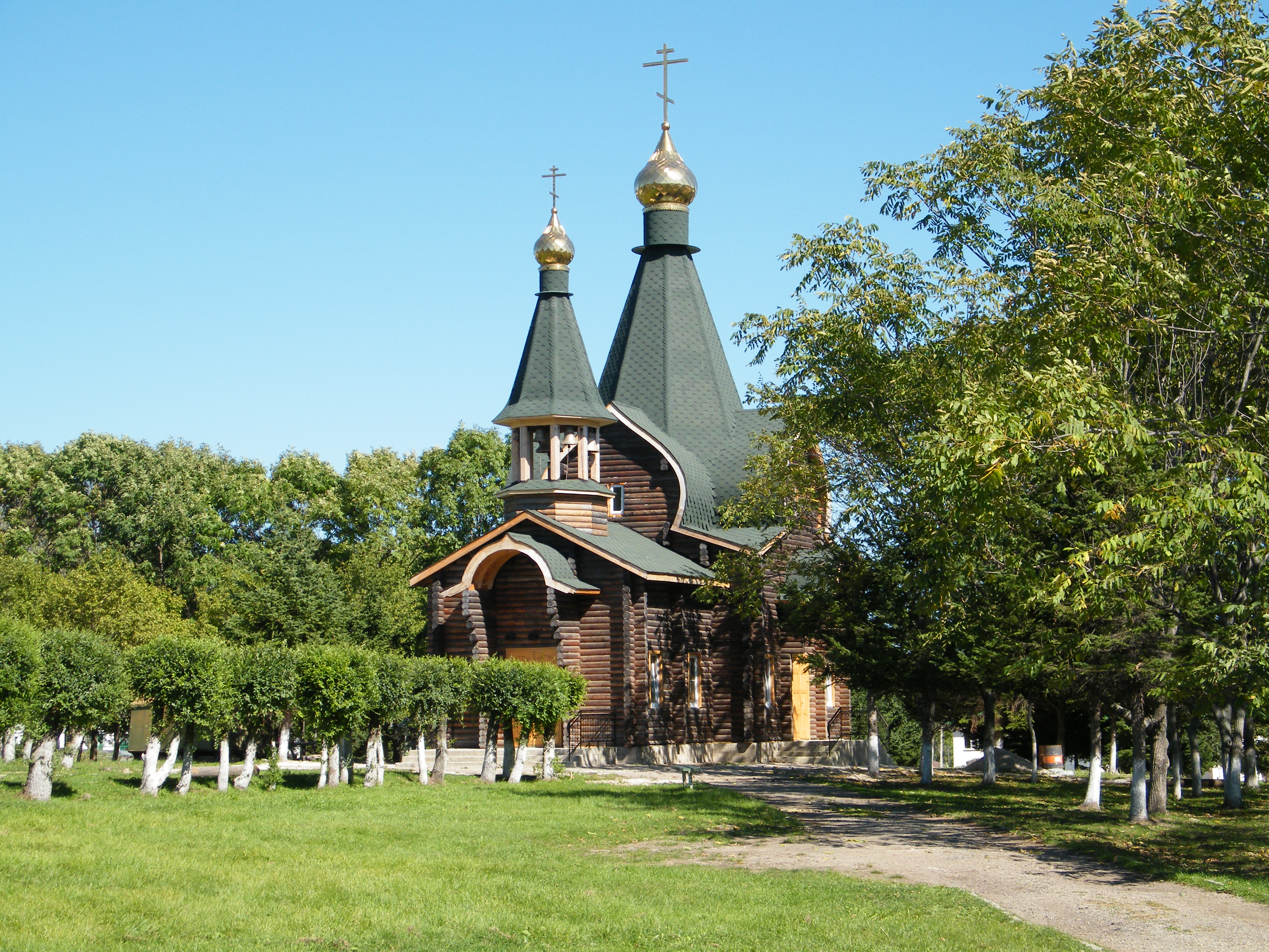 Поселок Ольга.Церковь.